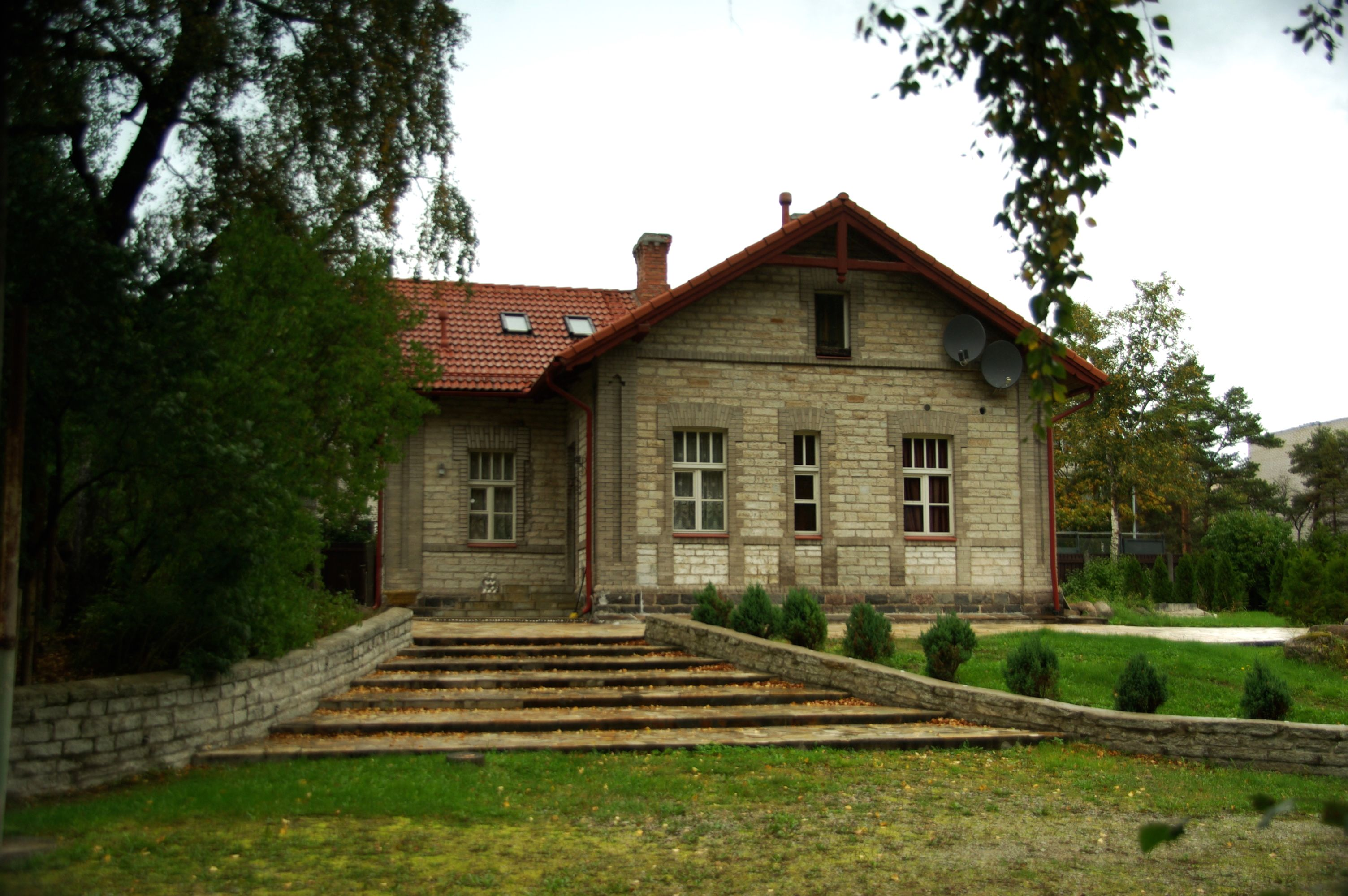 Harju maakond, Tallinna linn, Nõmme linnaosa Vabaduse pst 183